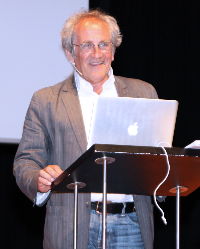 Reinhard Kahl bei einem Vortrag am 6. 5. 2011 im Cubus in Wolfurt.